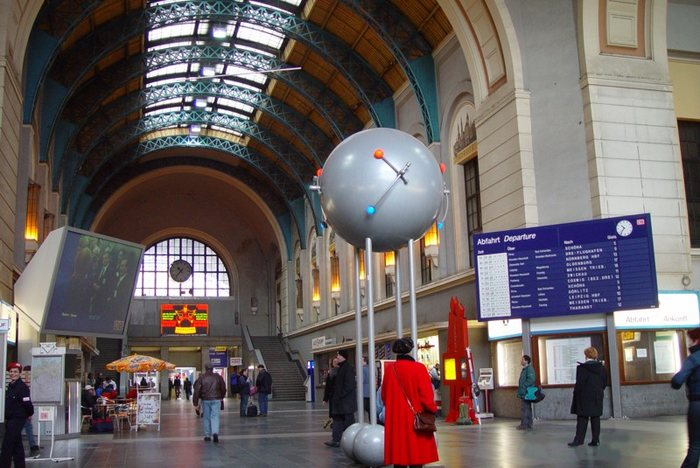 Dresden Hauptbahnhof im Juni 2002, Osteingang.